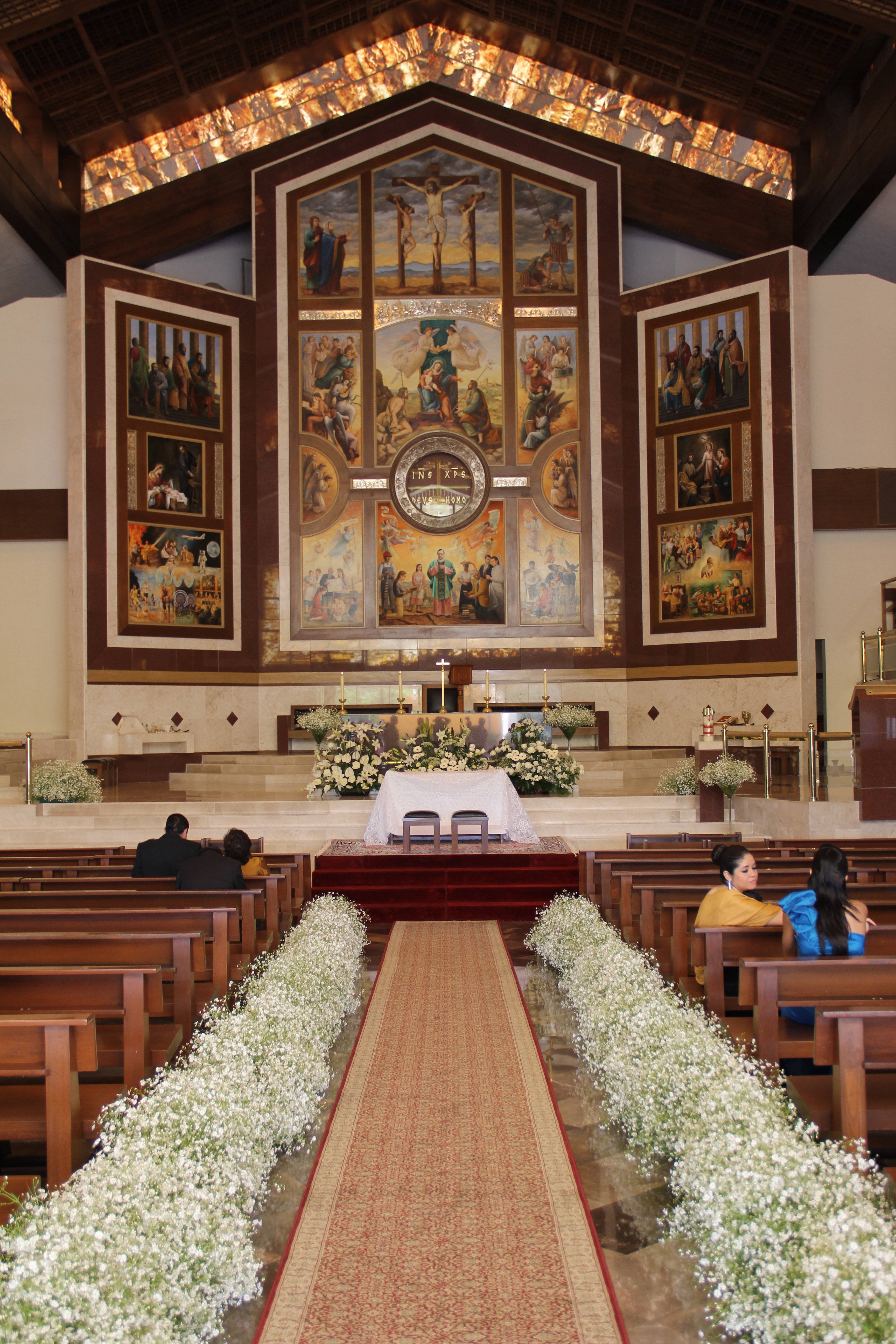 Altar de la Iglesia de Josemaria Escriva en Guadalajara Mexico